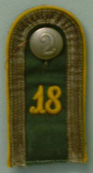 Unteroffizier der 2. Eskadron Reiter-Regiment 18 der Reichswehr, Achselklappe mit goldgerlber Paspelierung.